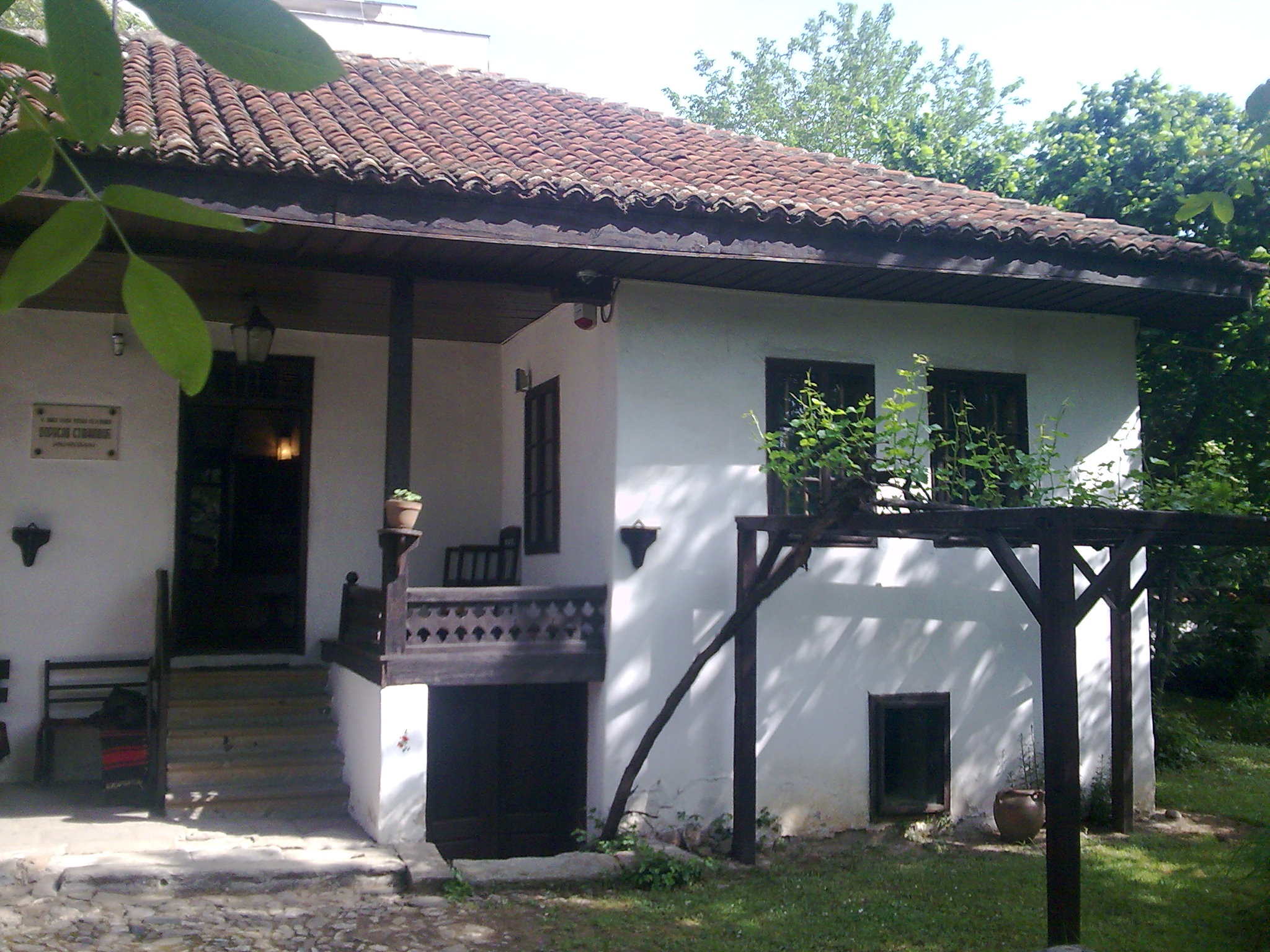 Kuća Bore Stankovića